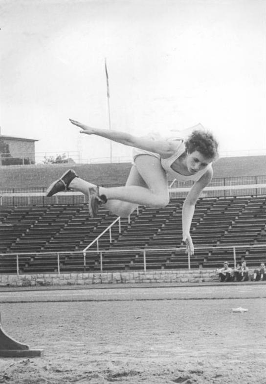 Waltraud Paluszkiewicz Zentralbild Funck 26.6.1955 Berliner Mehrkampfmeisterschaften der Männer und Frauen. Im Berliner Walter-Ulbricht-Stadion wurden am 25. und 26. Juni 1955 die Berliner Mehrkampfmeisterschaften der Männer und Frauen ausgetragen. UBz: Im Fünfkampf der Frauen gilt Paluszkiewicz (Einheit Nordost Berlin) als aussichtsreiche Kandidatin. Paluszkiewicz beim Hochsprung.